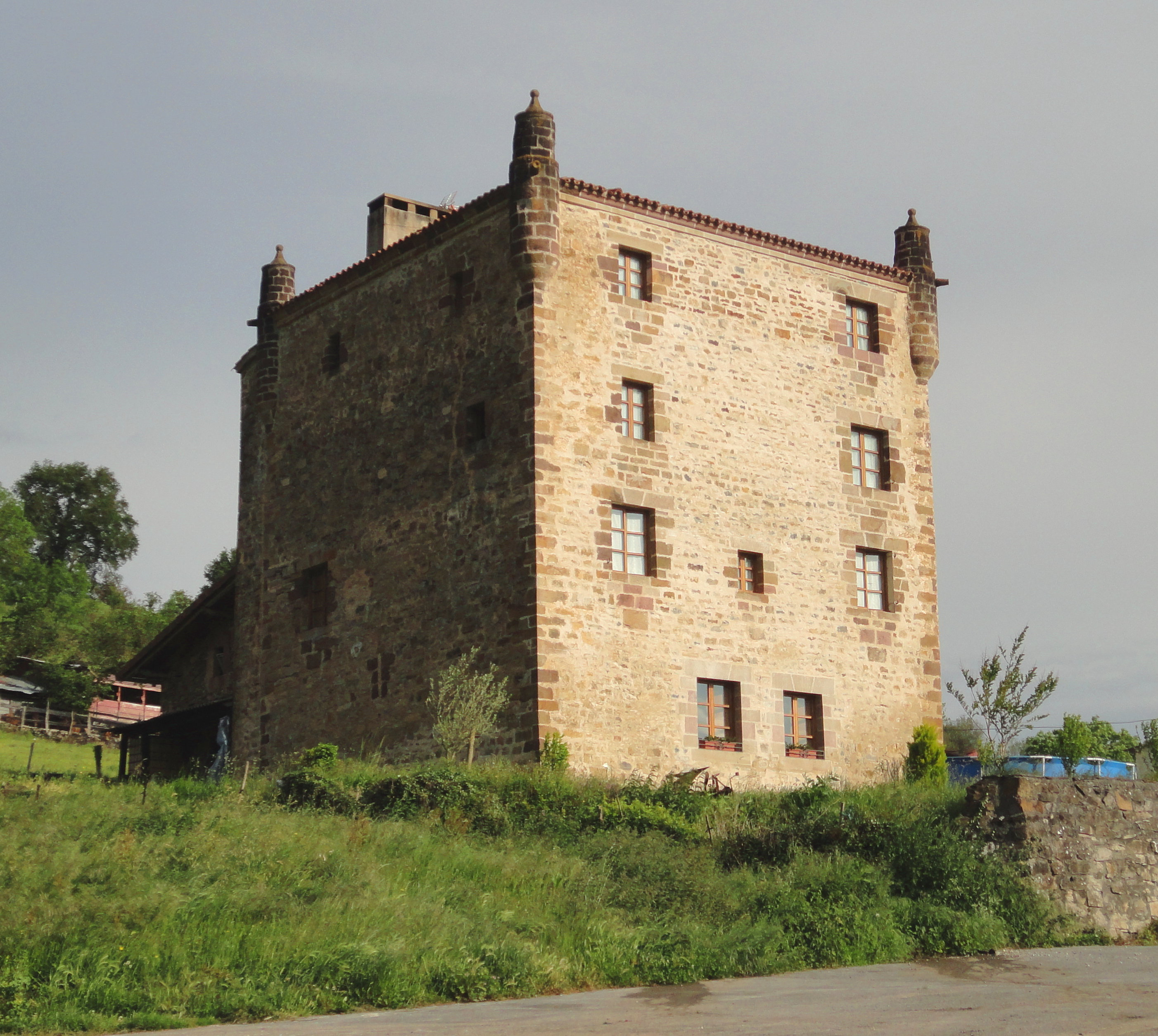 Zozaiako jauregia. XVI. mendea.